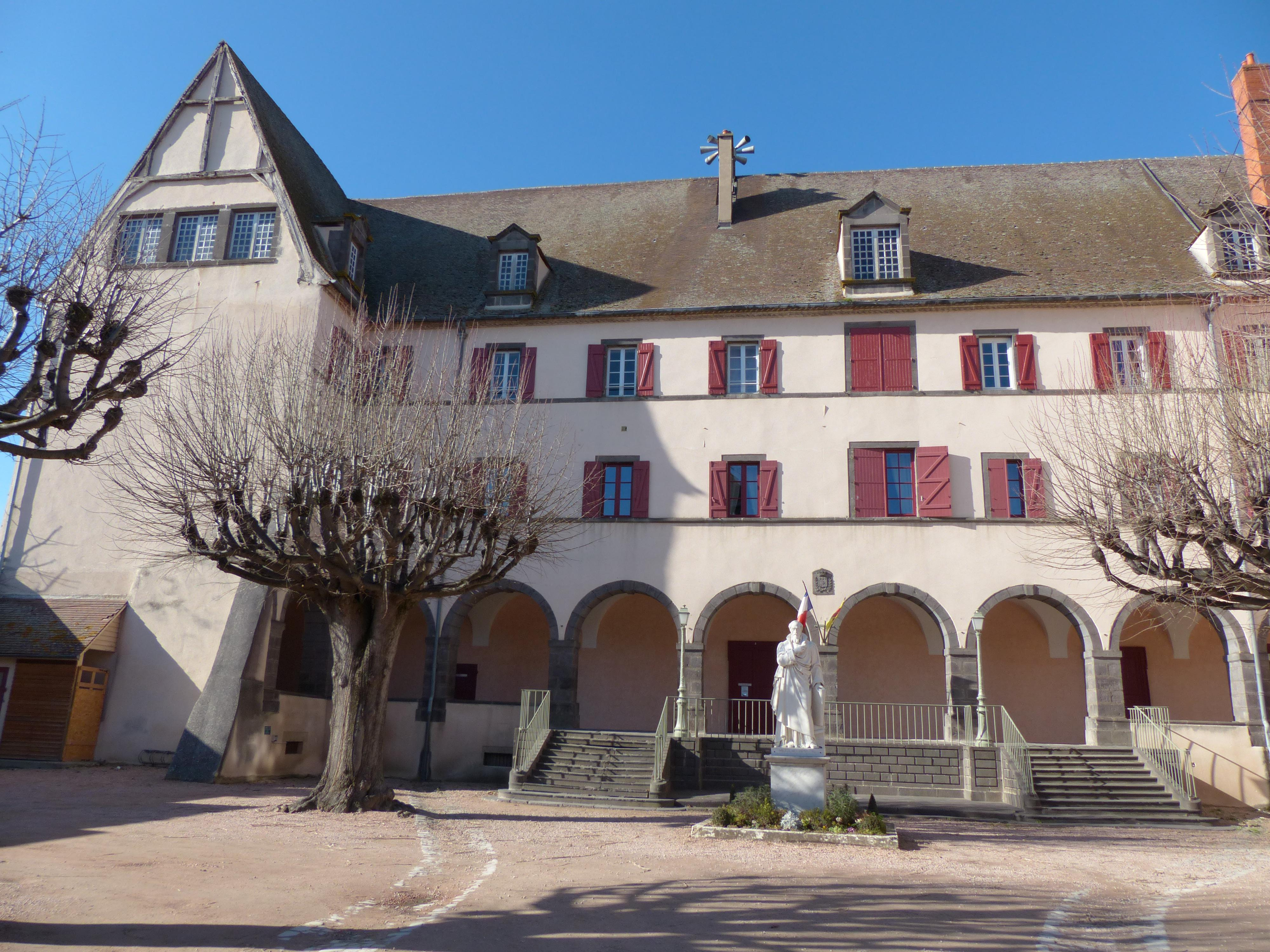 Façade de l'hôtel de ville d'Aigueperse (Puy-de-Dôme), ancien couvent des ursulines.